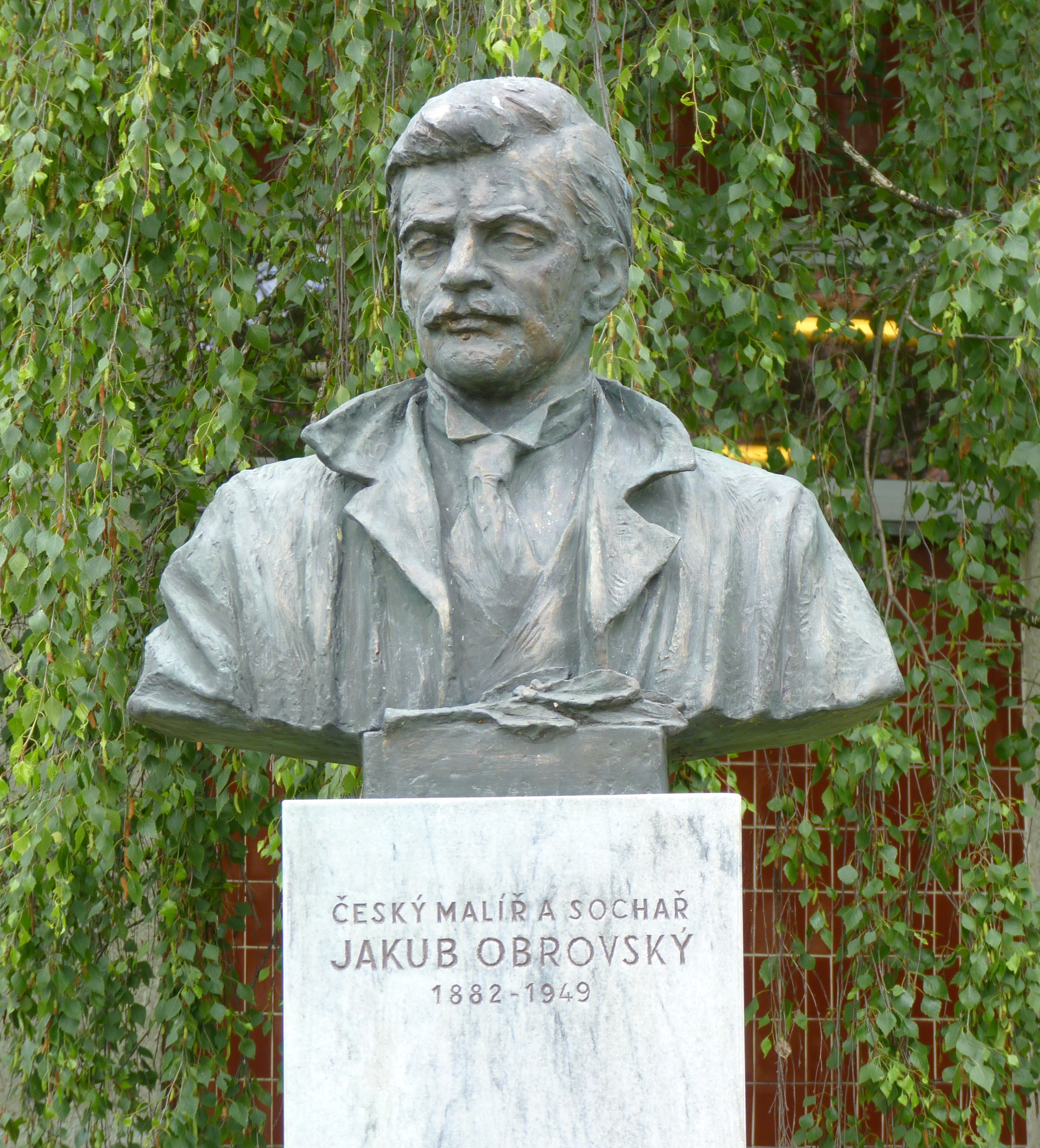 Busta Jakuba Ostrovského. Brno-Bystrc